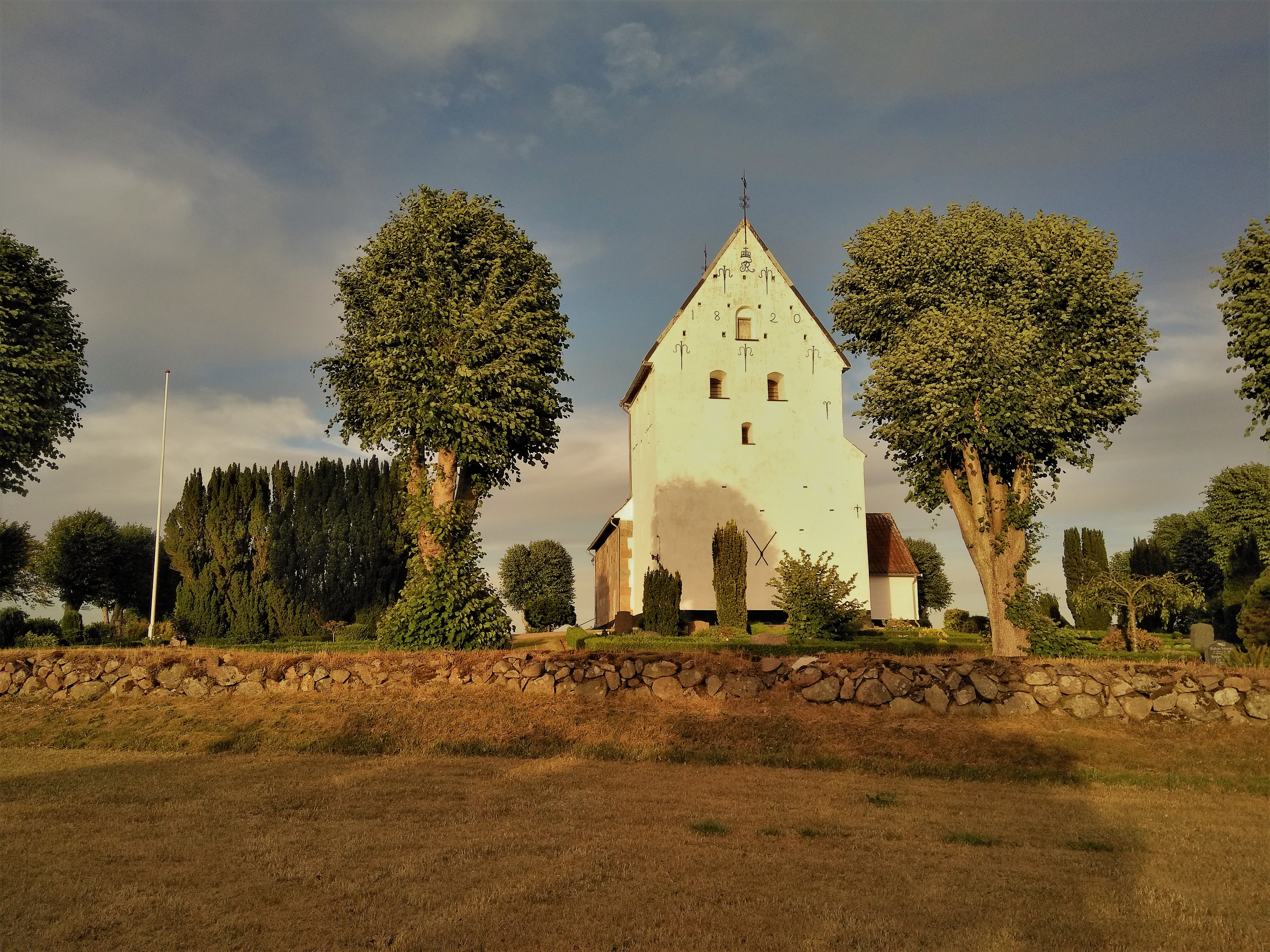 Vaade läänest tornile. Esiplaanil piirdeaed ja pärnade rivi.